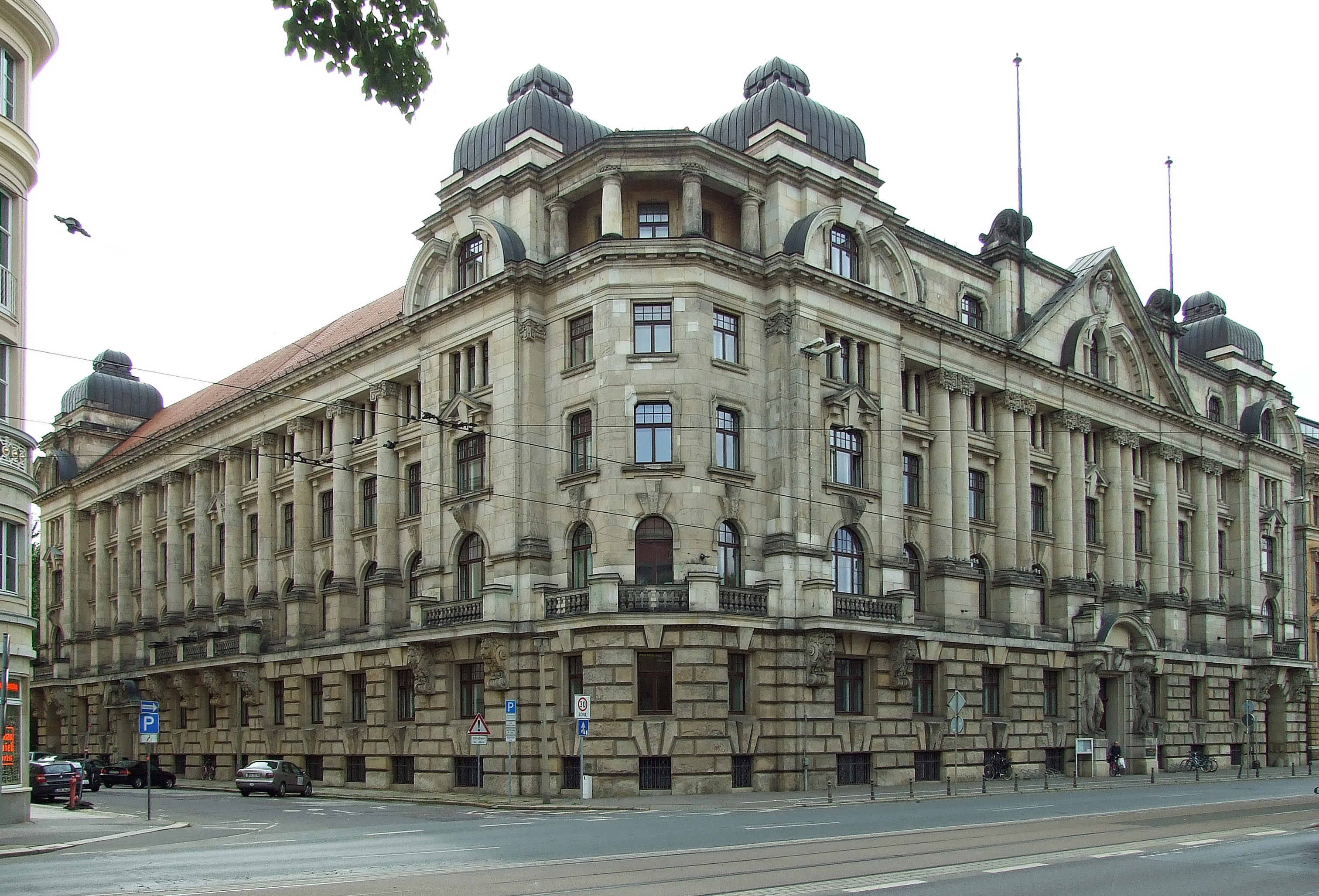 Hochschule für Musik und Theater "Felix Mendelssohn Bartholdy" am Dittrichring 21, Leipzig. Ehemaliges Alte-Leipziger-Gebäude; Filiale der Dresdner Bank; Haus der deutsch-sowjetischen Freundschaft.